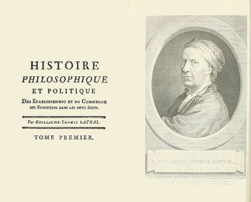 Signature par Raynal de Histoire des deux Indes, volume premier, J.-L. Pellet, Genève, 1780.